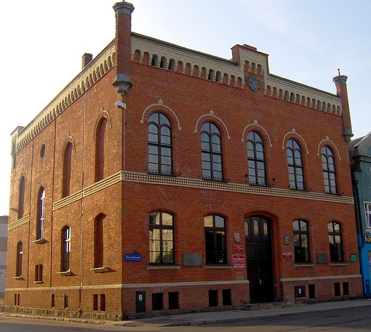 ratusz w Pucku city hall, Puck, Poland, summer 2006 Autor: Krzysztof